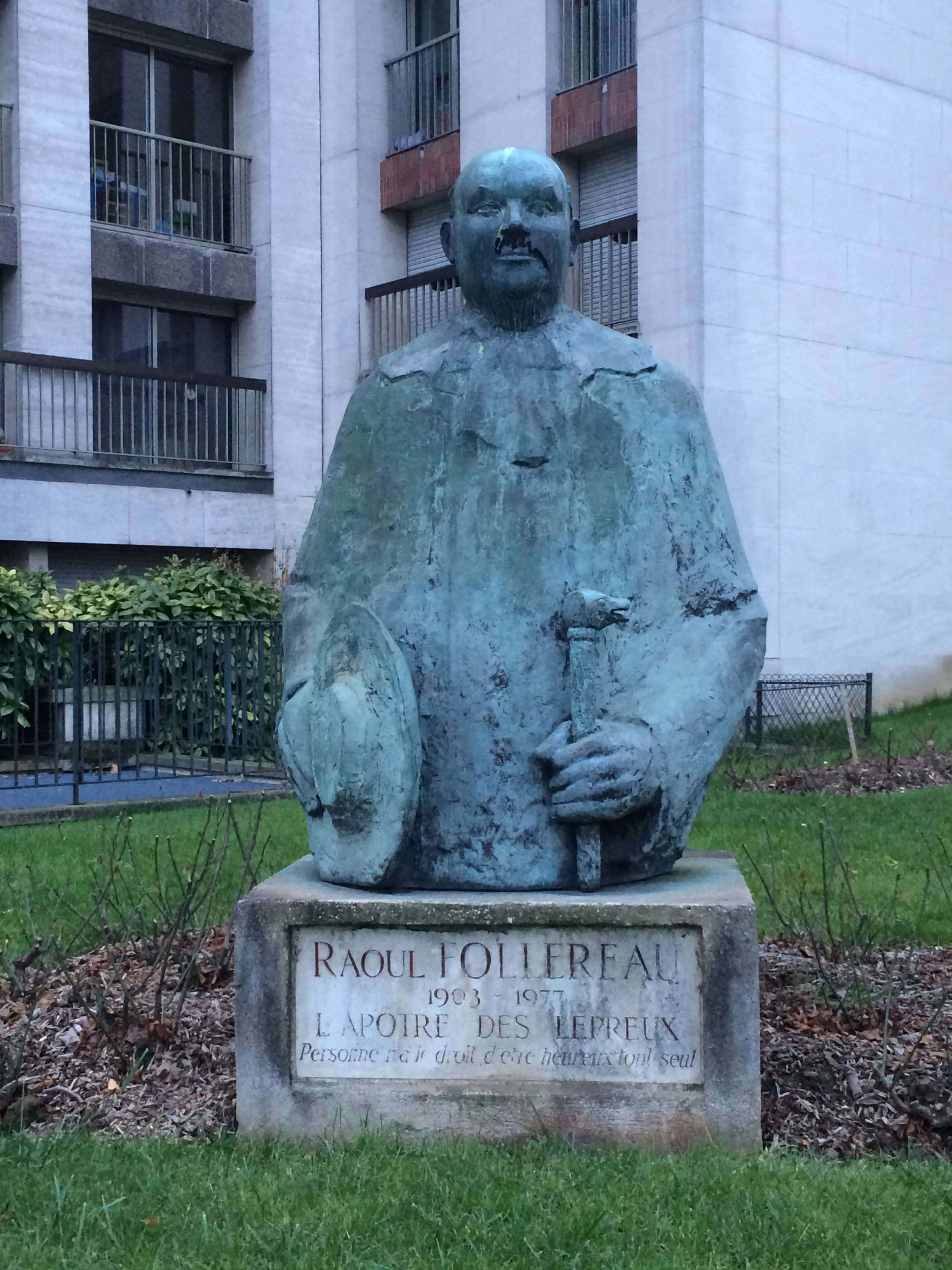 Statue en hommage à Raoul Follereau, écrivain, journaliste et fondateur d'une oeuvre dédiée à la lutte contre la lèpre